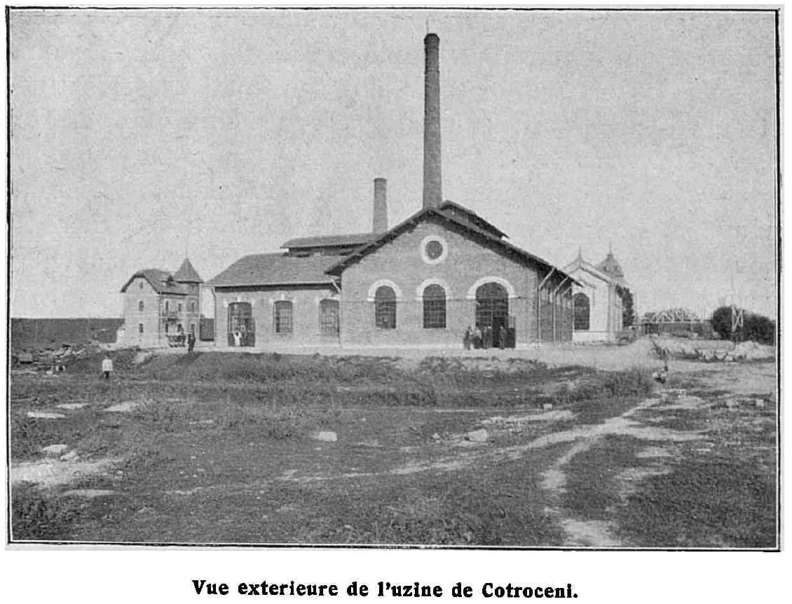 1906 - Uzina Electrică de la Cotroceni,București, România - vedere exterioară